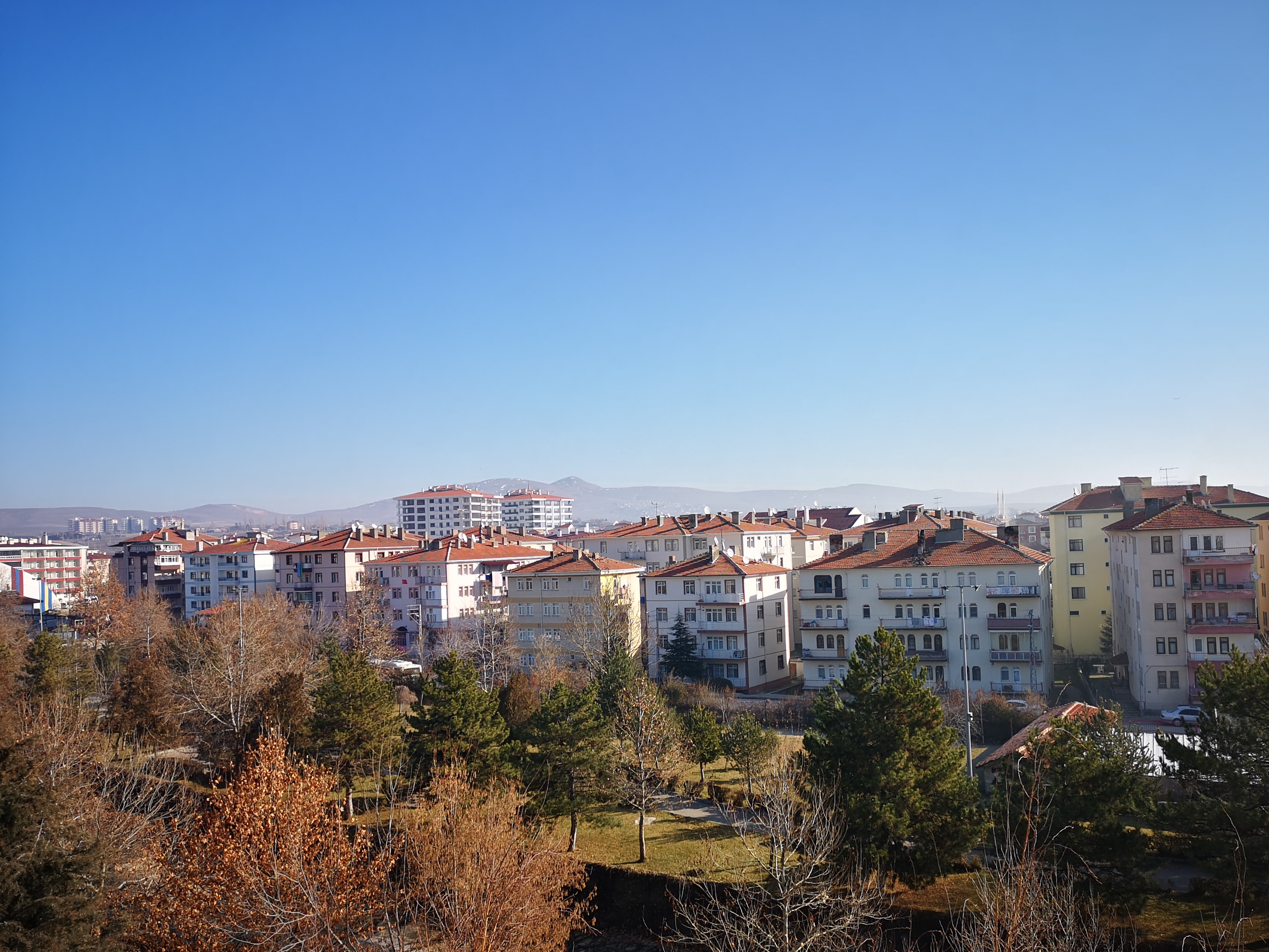 Yeşil Çubuk Parkı